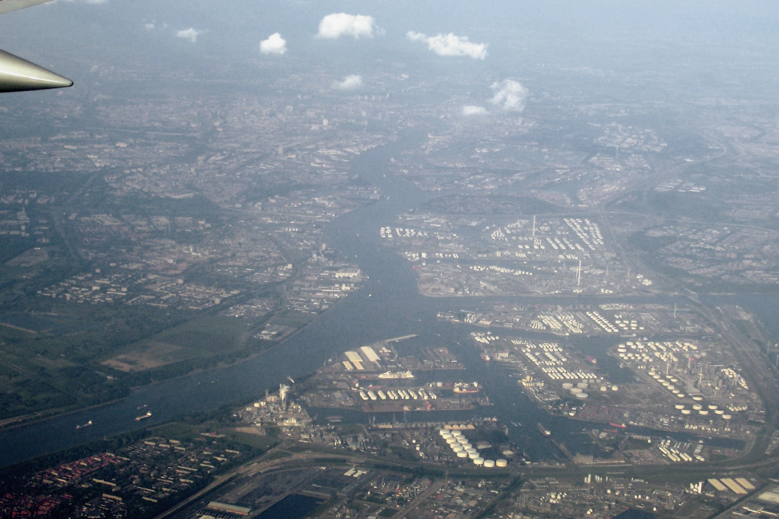 Rotterdam Rotterdam Categorie:Lucht-satelietfoto Rotterdam